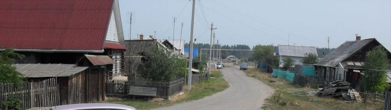 Вид на посёлок